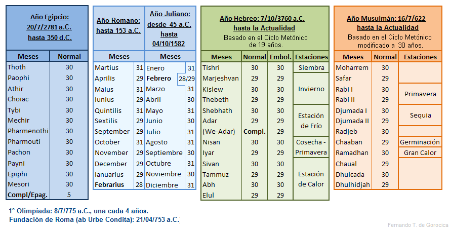 Comparación entre los calendarios solares Egipcio y Romano (Juliano-Gregoriano) y los lunares Hebreo y Musulmán. Ver Tabla de equivalencias entre los calandarios: Nabonassar, Egipcio y Juliano-Gregoriano.